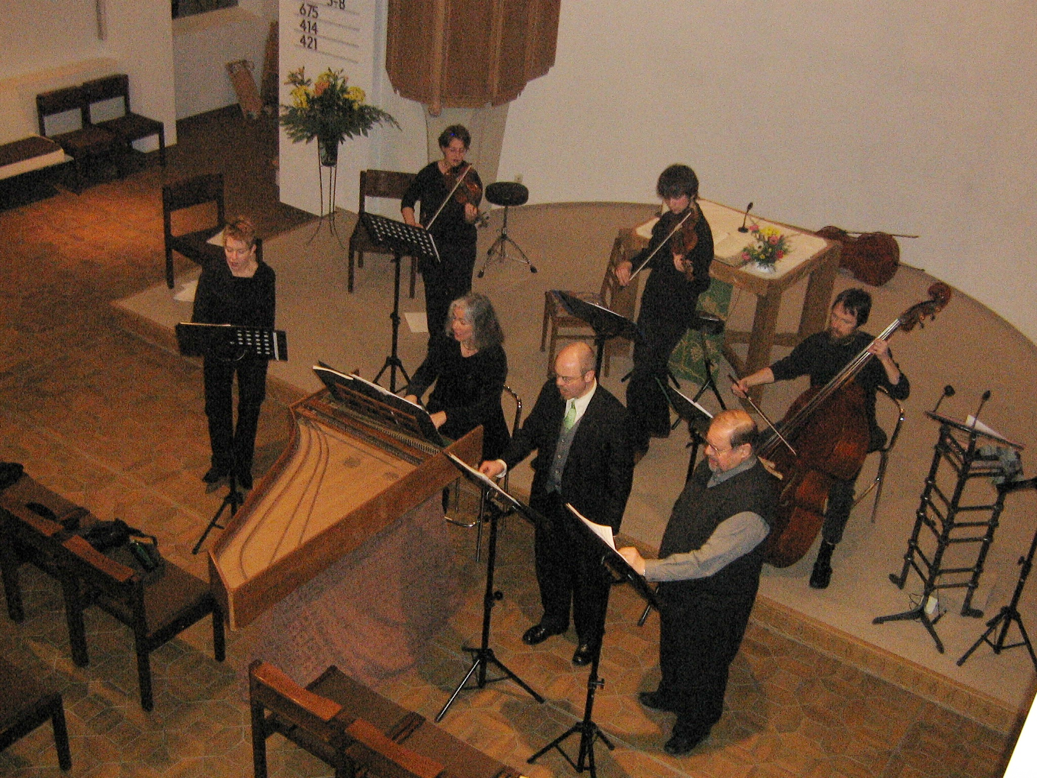 Soloensemble der Kreuznacher Diakonie Kantorei (Konzert) (Buxtehude-Kantate "Alles, was ihr tut"). Sopran: Gabriele Steinmetz; Alt und Cembalo: Doris Kickton, Tenor: Andreas Kampmann; Bass: Rudolf Gross; Violinen: Andrea Gälweiler und Fabian Darstein, Kontrabass Helmut Kickton